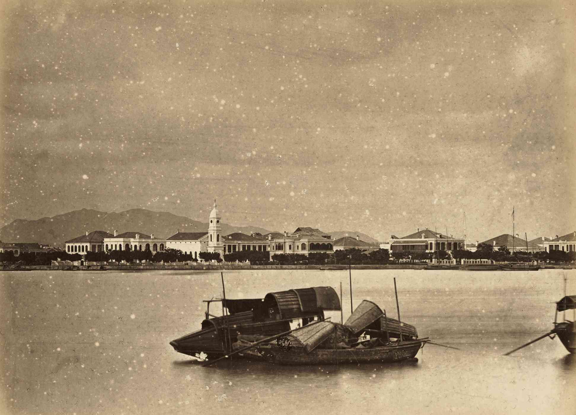 Shamian Island